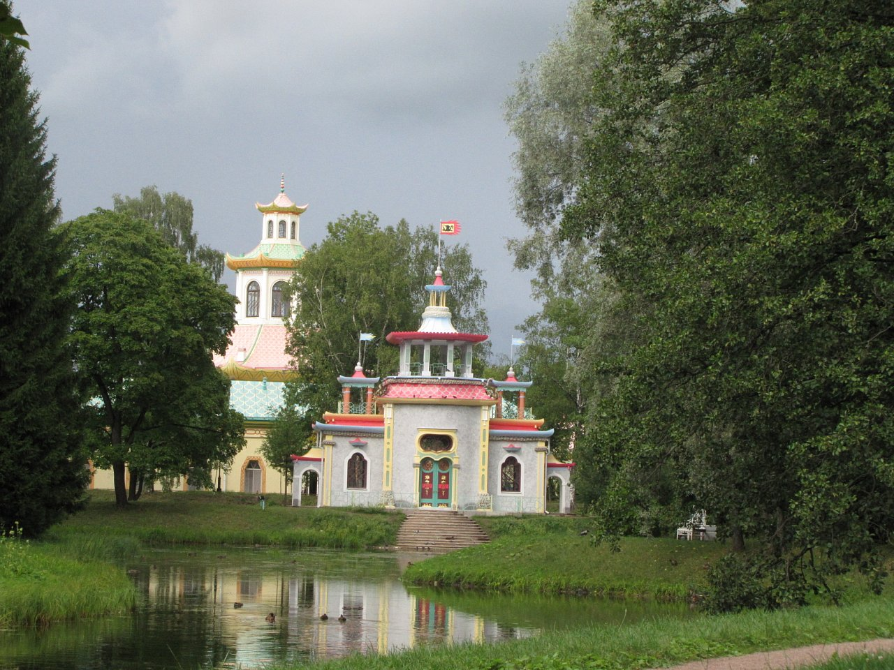 Китайская деревня (Санкт-Петербург и Лен.область, Пушкин, у Подкапризовой дороги)